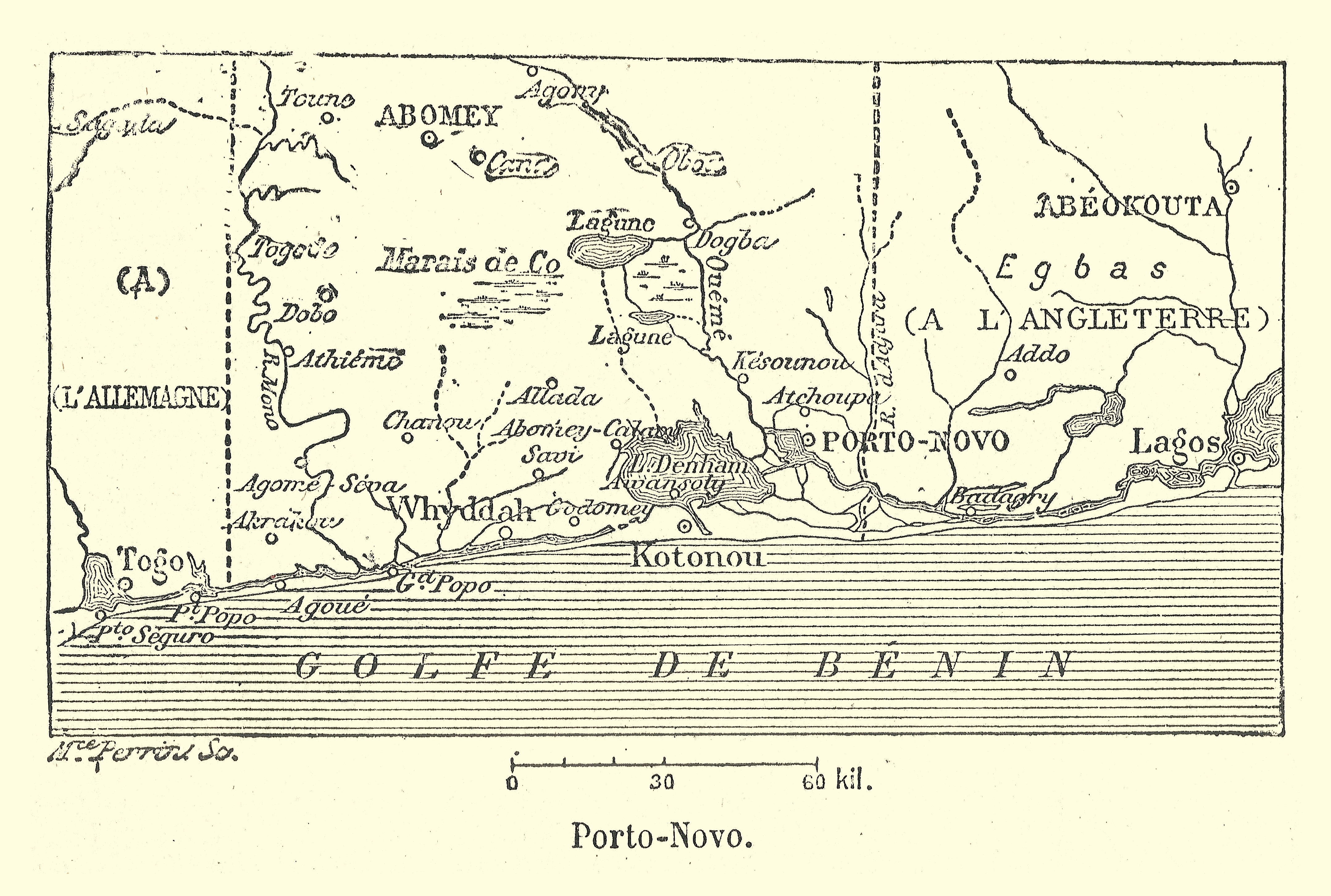 Carte de Franz Schrader